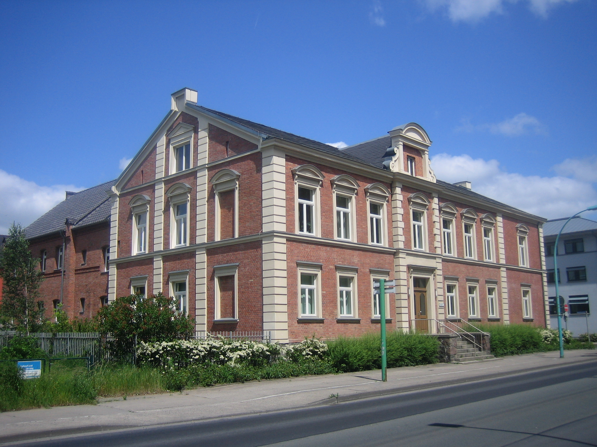 Landessozialgericht Mecklenburg-Vorpommerns, ehem. Amtsgericht mit ehem. Gefängnis und Hofmauer, Gerichtsstraße 10, Neubrandenburg, Mecklenburg-Vorpommern